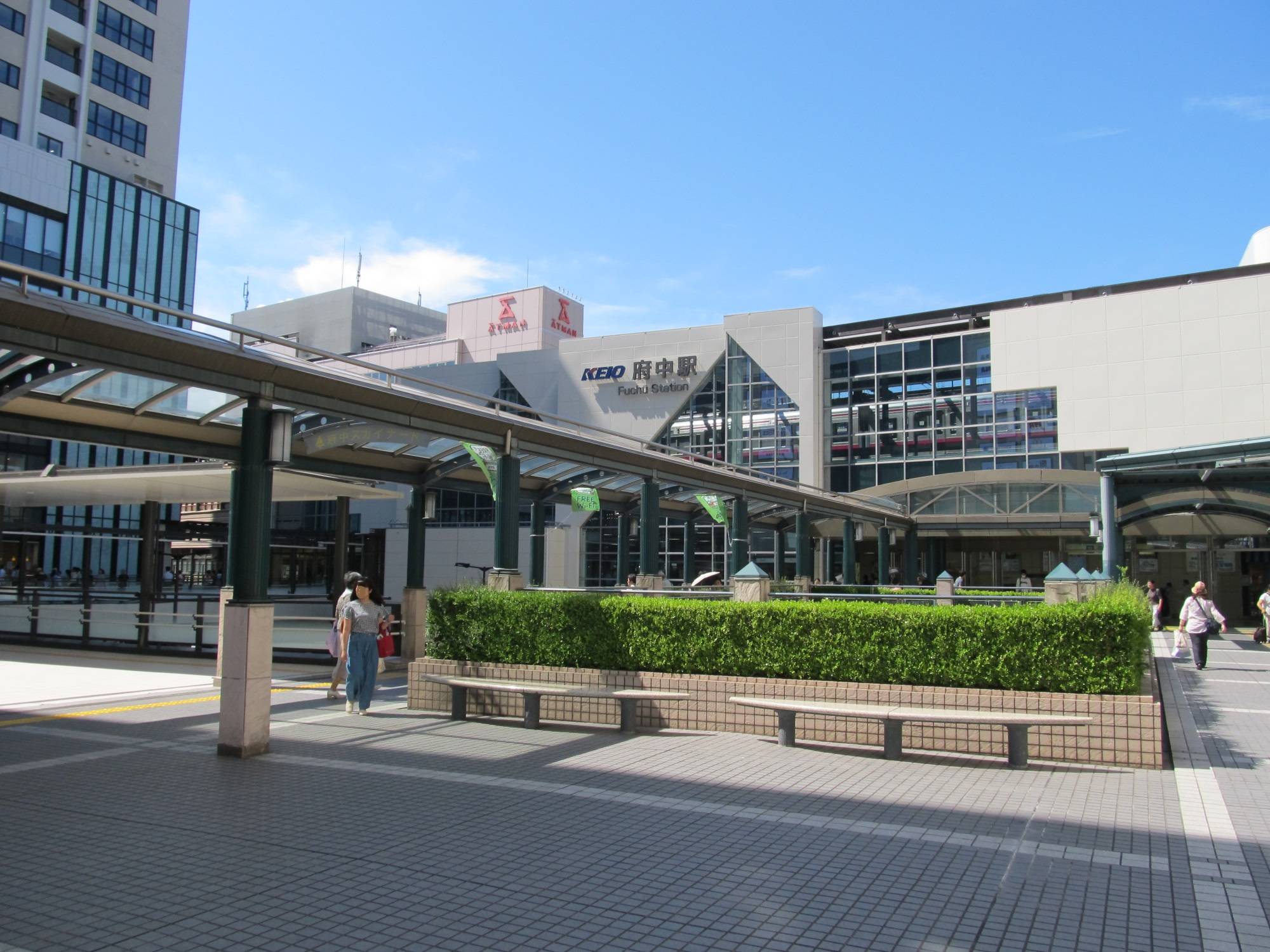 京王線府中駅南入口（2F)